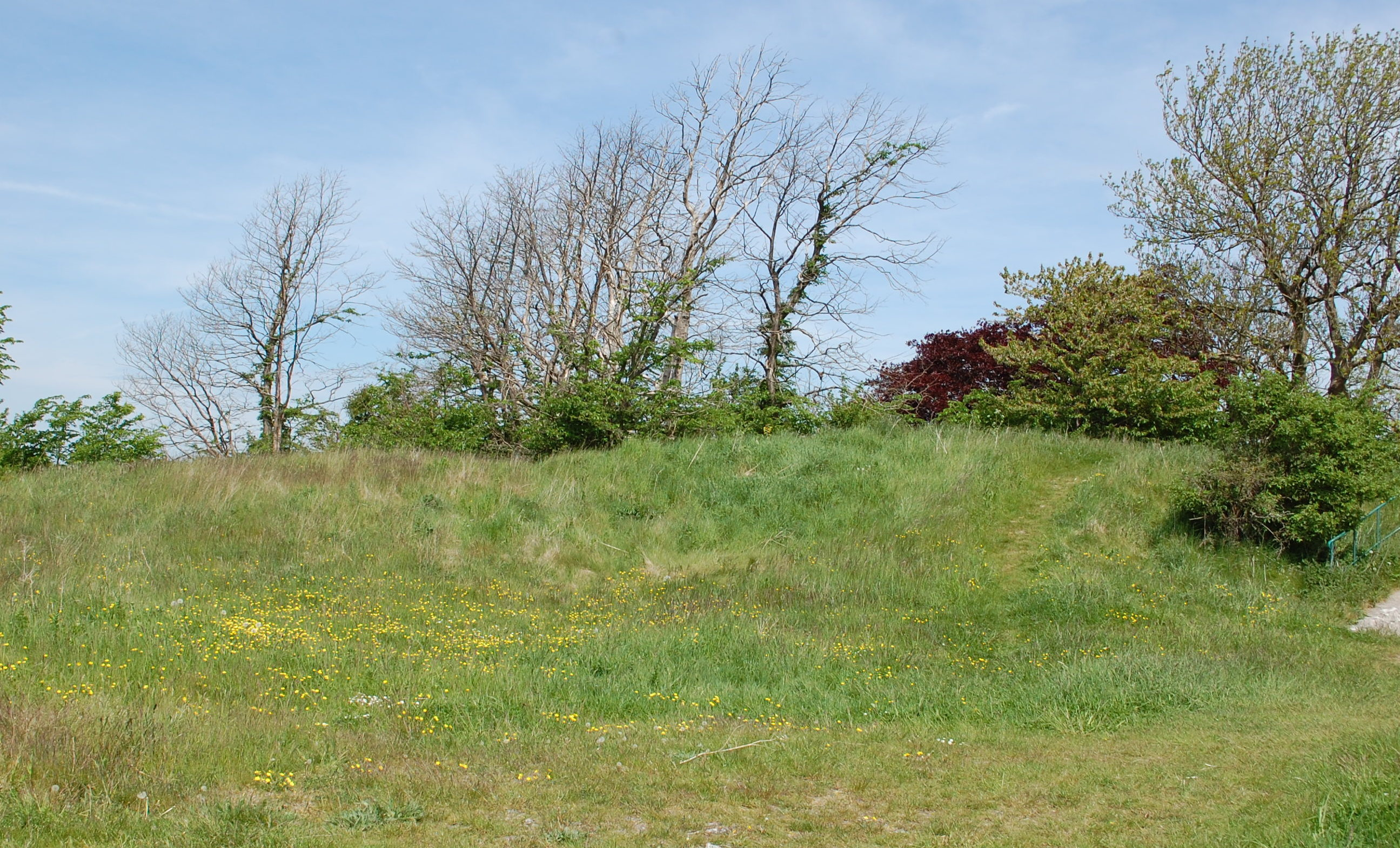 Grabhügel Bålhög bei Smygehamn